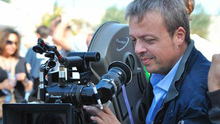 Durante le riprese del film "Non me lo dire"